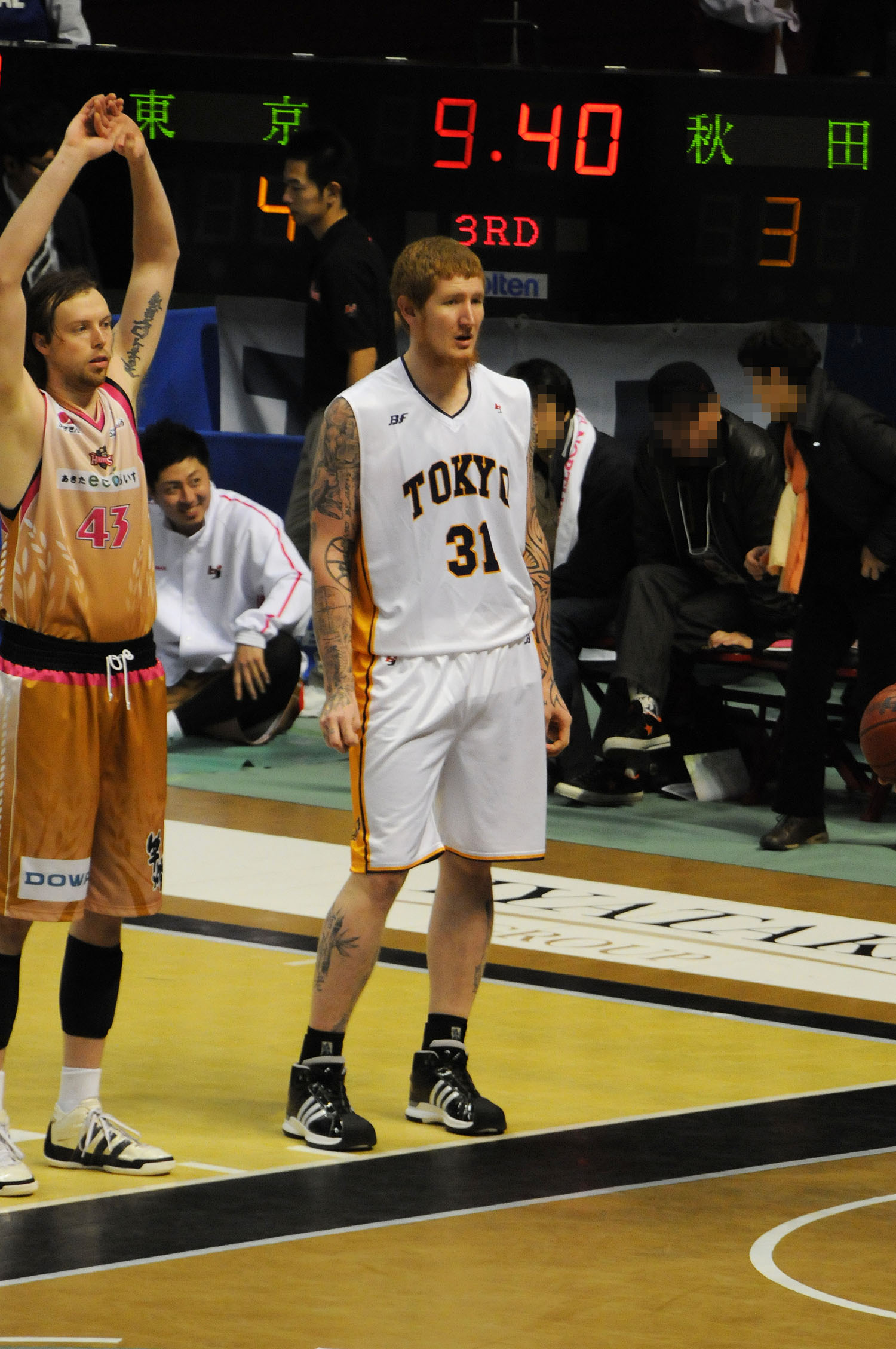 東京アパッチ、ロバート・スウィフト選手。秋田市立体育館で。